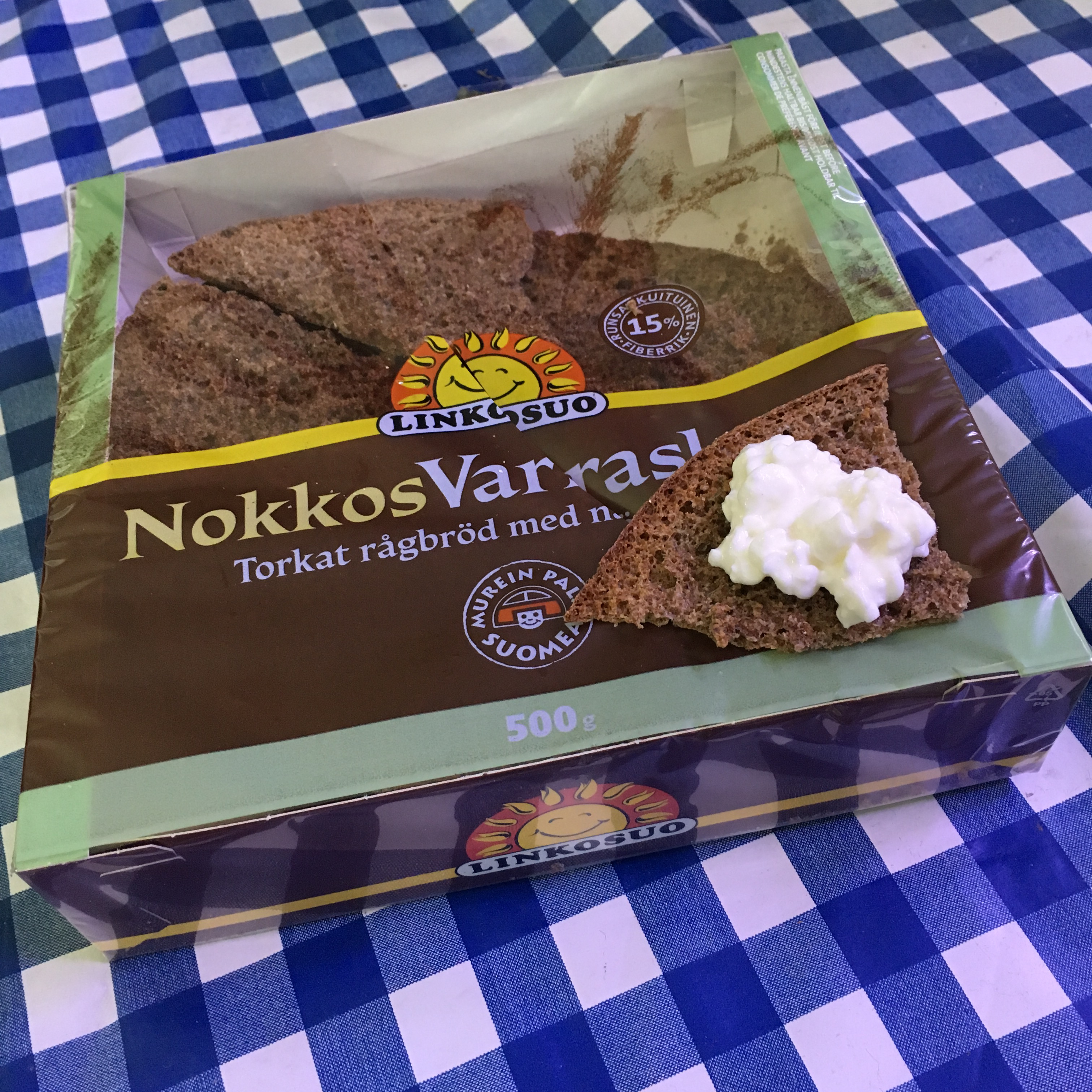 Linkosuon nokkos varras leipää ja raejuustoa